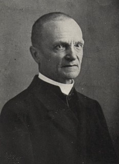 Alois Slovák (1859 - 1930), Katolický kněz, jezuita a středoškolský profesor.